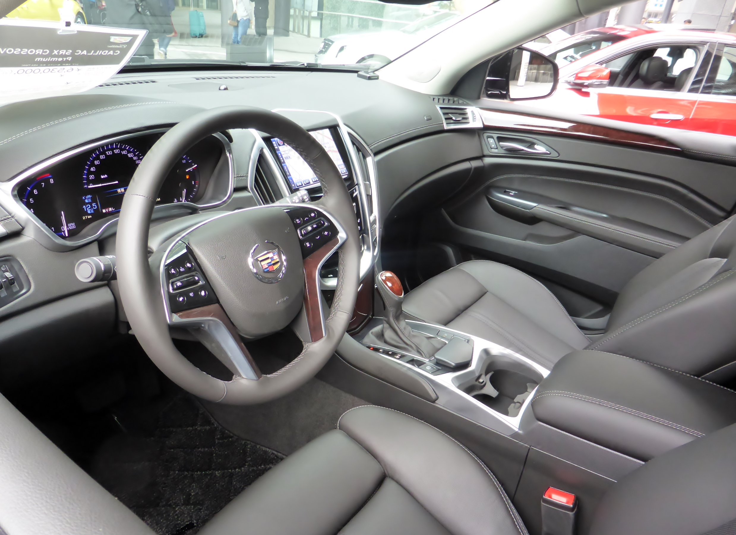 ABA-T166C型キャデラック・SRXクロスオーバーPremiumのインテリアを撮影。